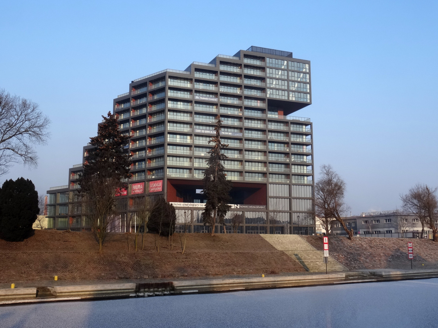 Budynek mieszkalny Nordic Haven w Bydgoszczy